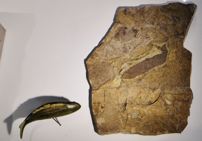 Fossil of Birkenia- Took the picture at Museum am Lowentor, Stuttgard